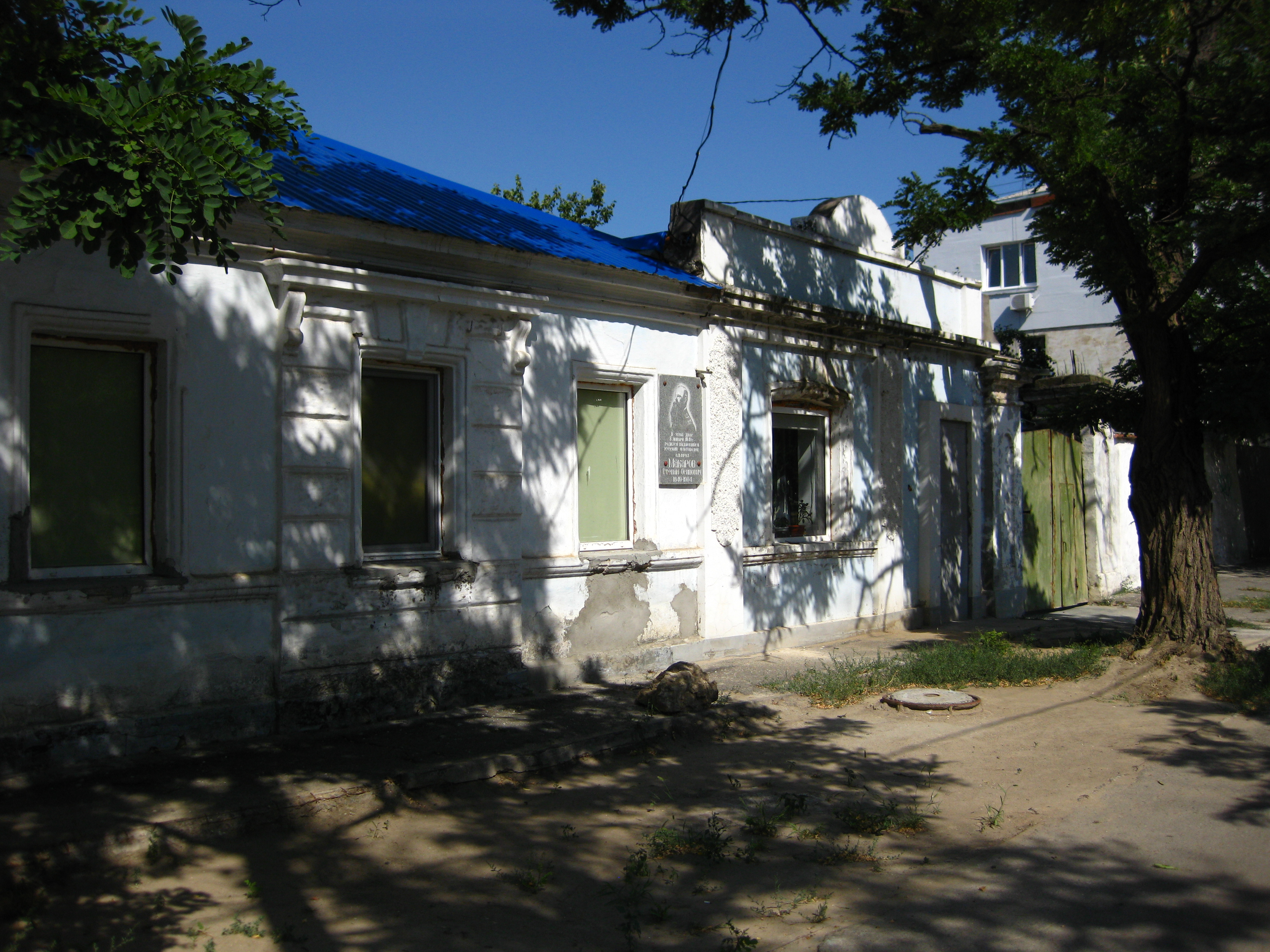 Дом, в котором родился Степан Осипович Макаров Надпись на табличке: В этом доме 8 января 1849 года родился выдающийся русский флотоводец адмирал Макаров Степан Осипович 1849-1904